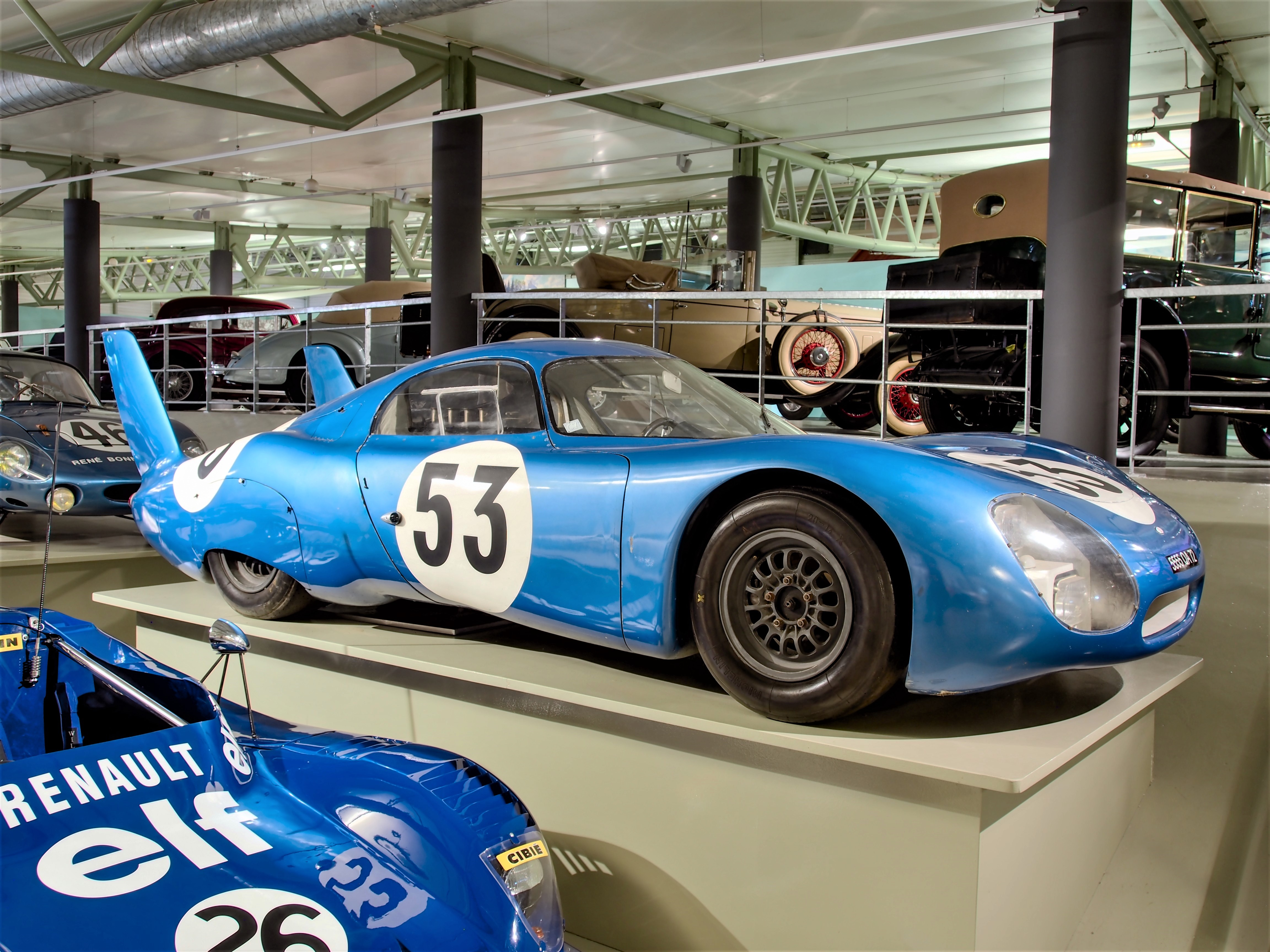 Photographed at Musée des 24 Heures du Mans, France.